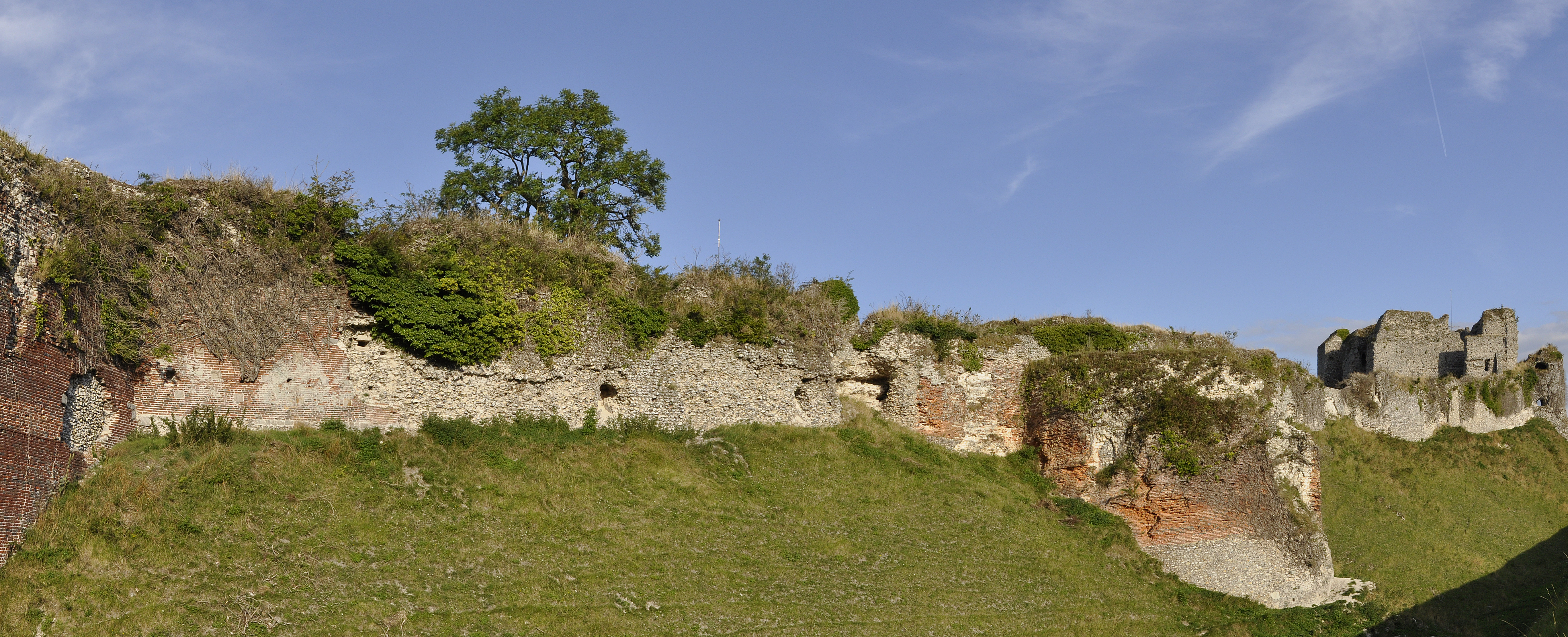 Het kasteel van Arques-la-Bataille, Frankrijk